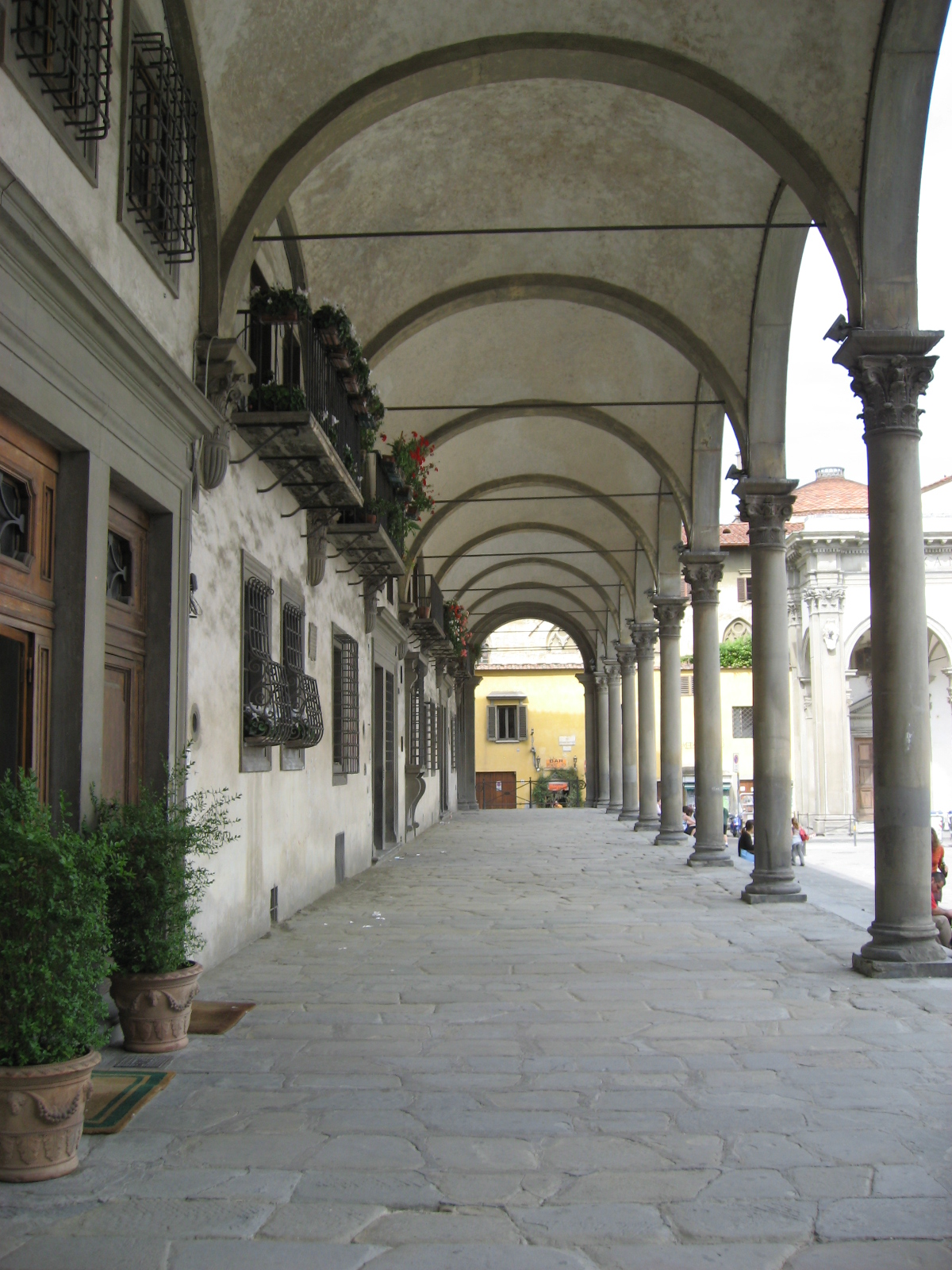 Piazza Santissima Annunziata